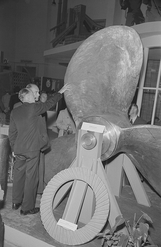 Original image description from the Deutsche Fotothek Zwei Personen an der Schiffsschraube des VEB Berliner Metallhütten- und Halbzeugwerke, Technische Messe 1953